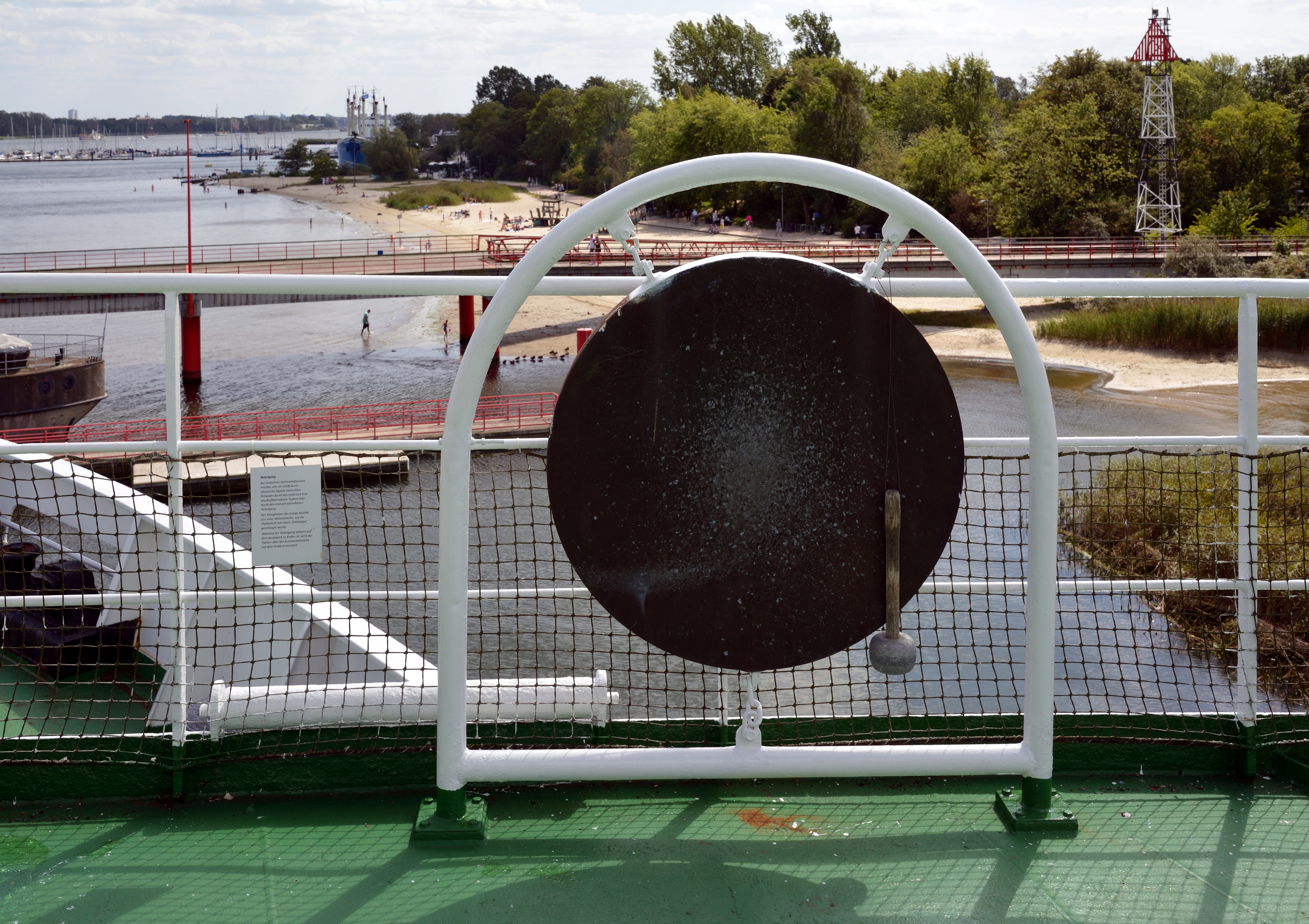 Ein Besuch auf dem Museumsschiff "Dresden" in Rostock im August 2019